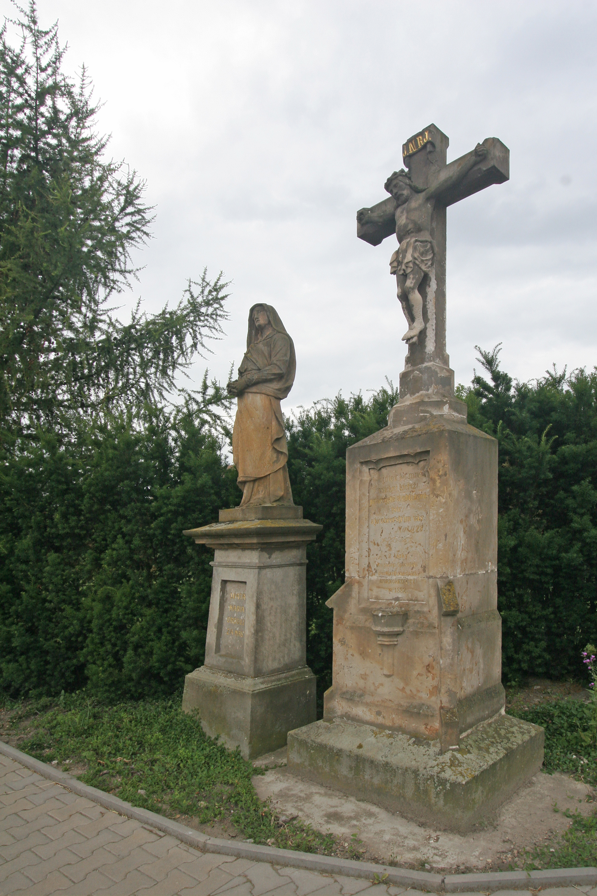 Horní Ředice křížek